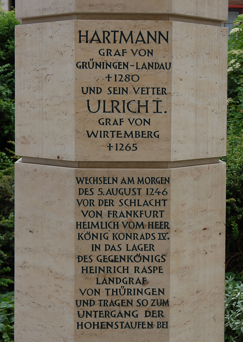 Ostexponierte Inschrift der Stauferstele vor der Bartholomäuskirche in Markgröningen